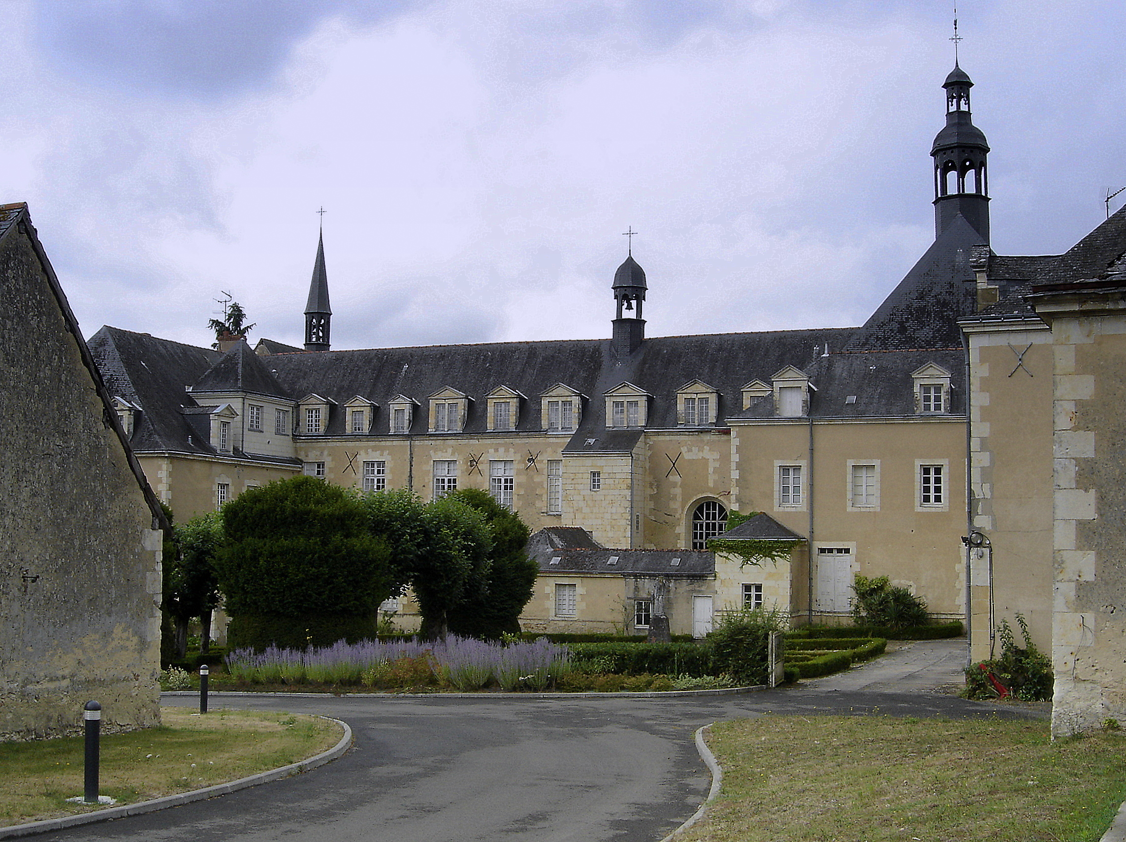 Hotel-Dieu de Baugé (Maine-et-Loire) .